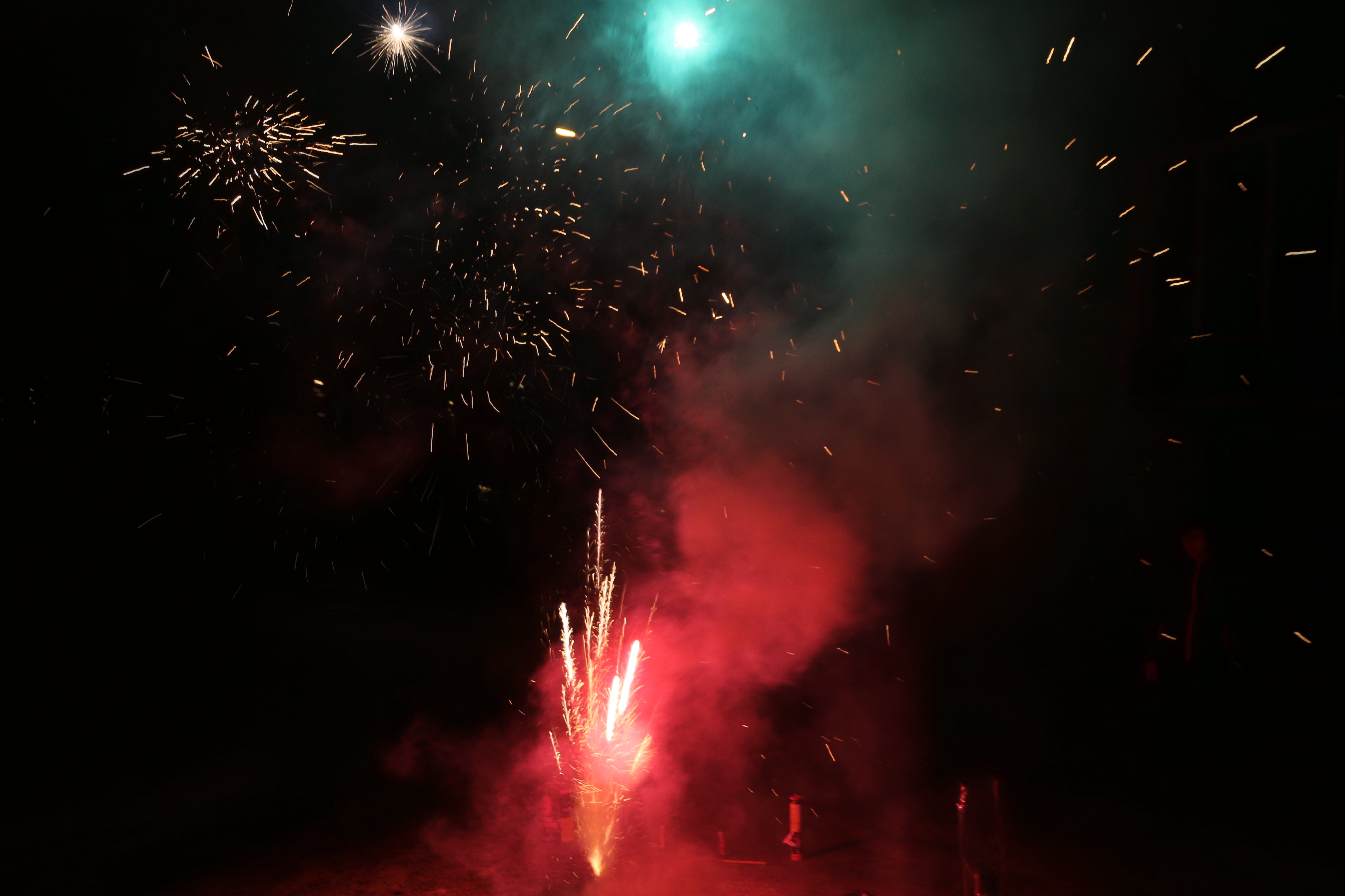 Happy New Year 2016-2017 from Gjøvik Norway.